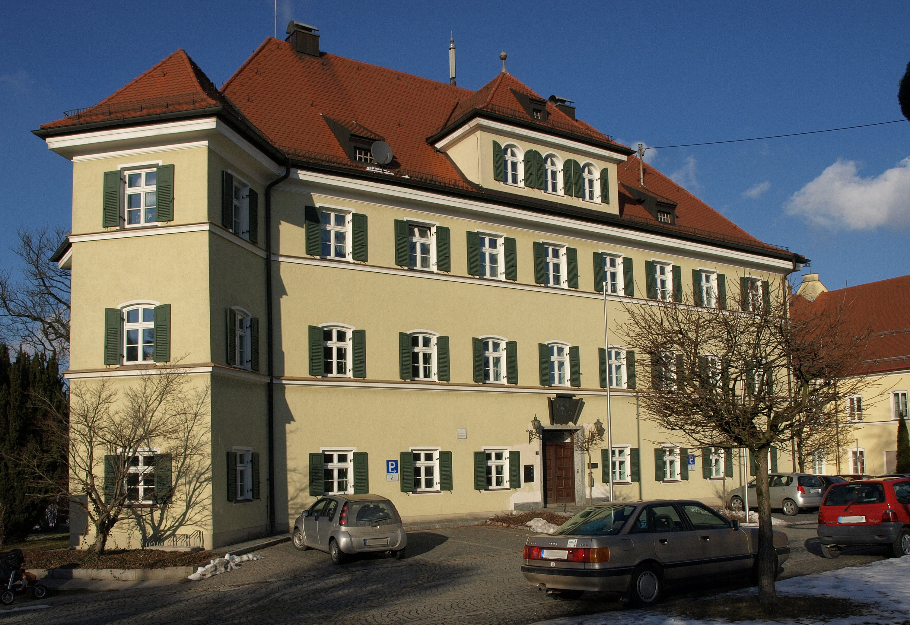 Rathaus Markt Haag in Oberbayern (Marktplatz 7; Haag i. Obb.)